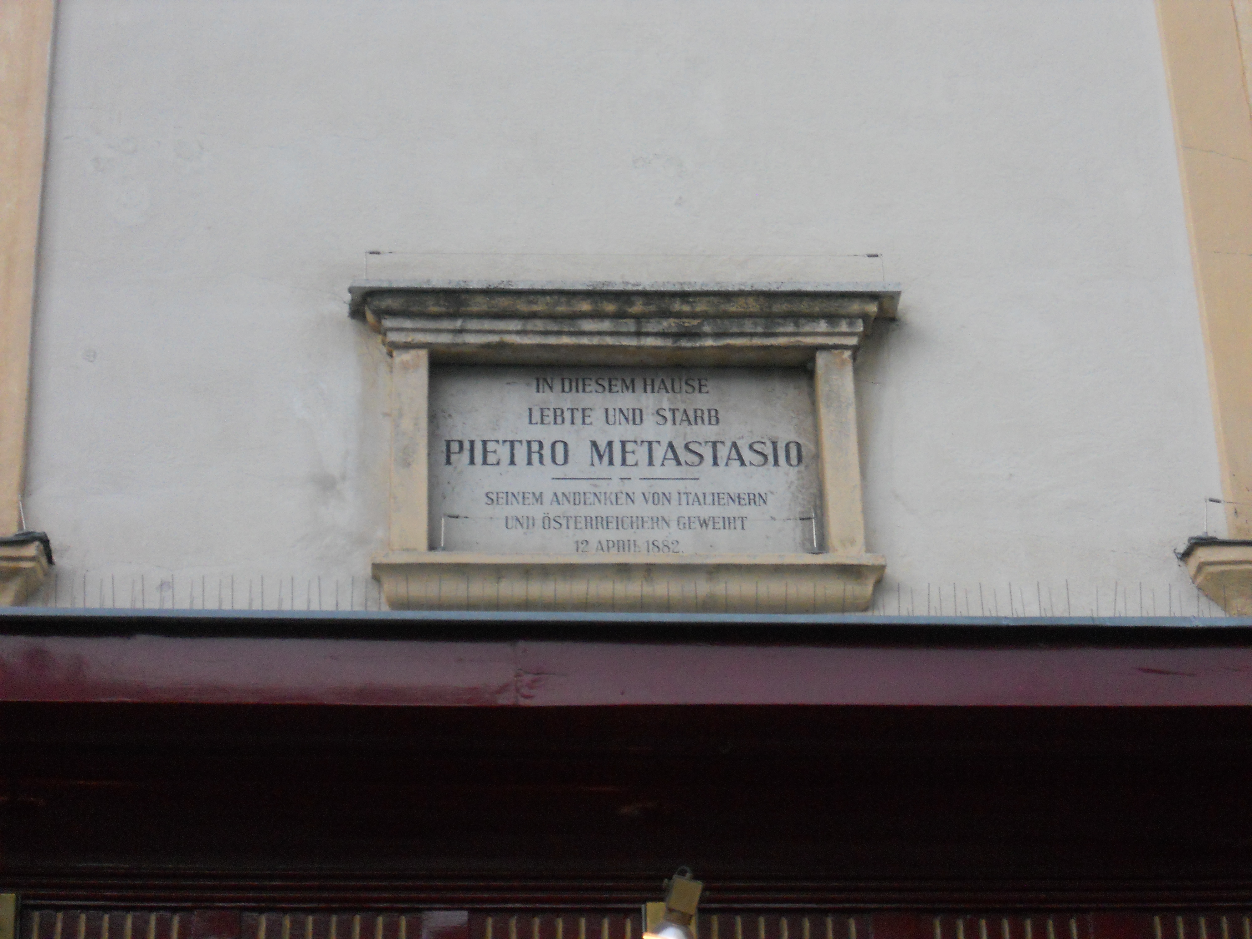 Großes Michaelerhaus, Gedenktafel für Pietro Metastasio